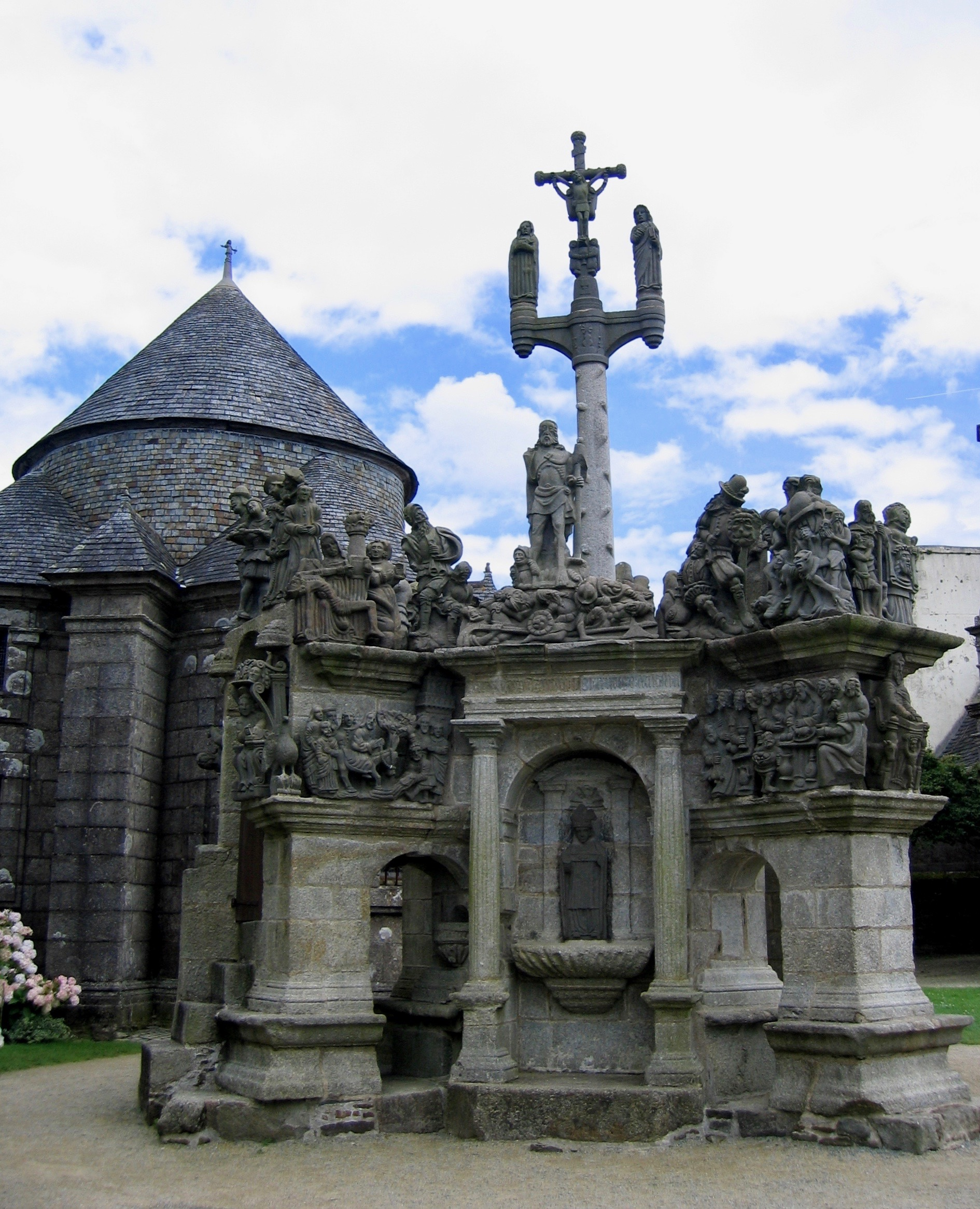 Calvaire de l'enclos paroissial de Guimiliau Finistère France